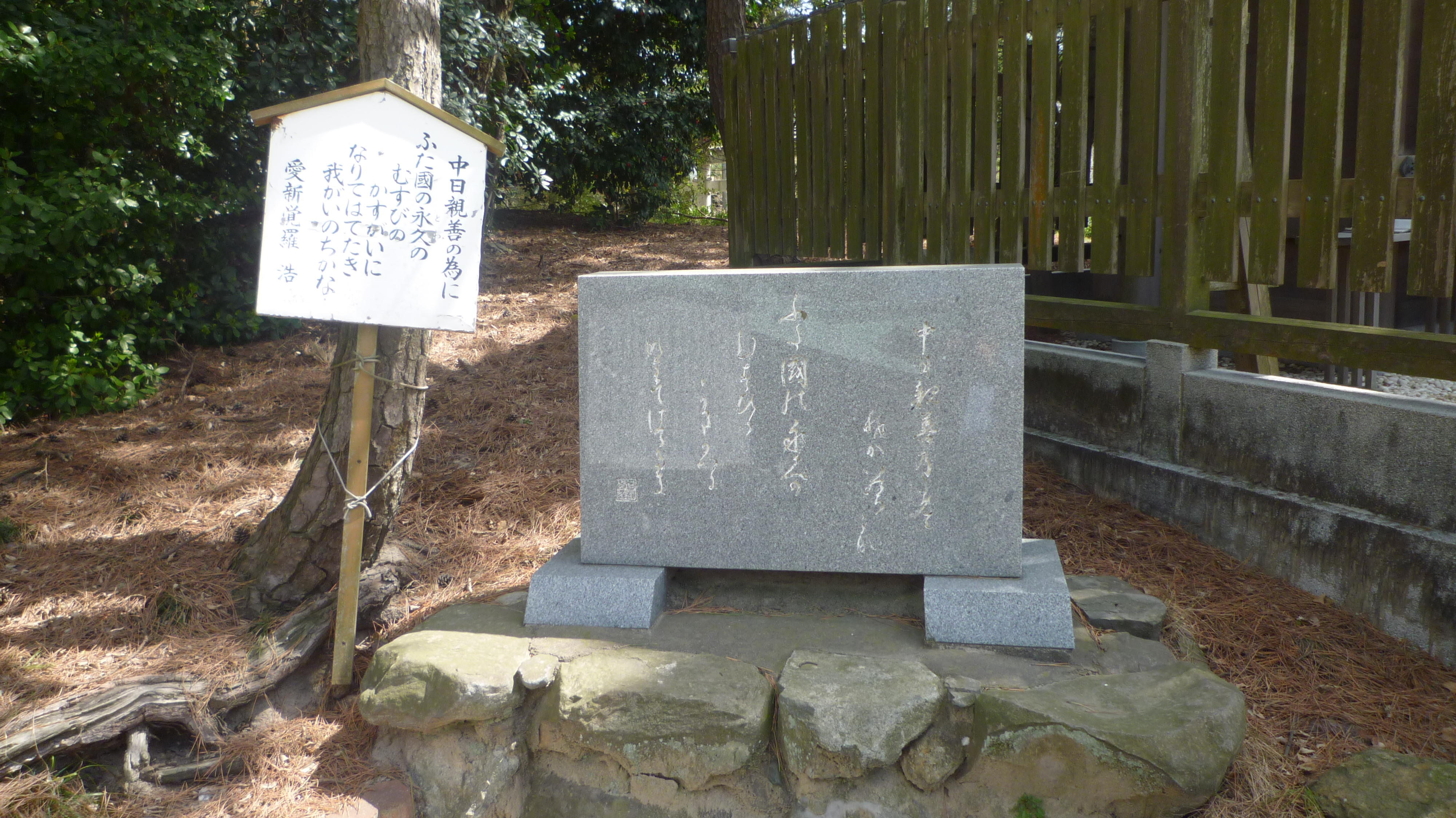 「流転の王妃」愛新覚羅浩さんの碑